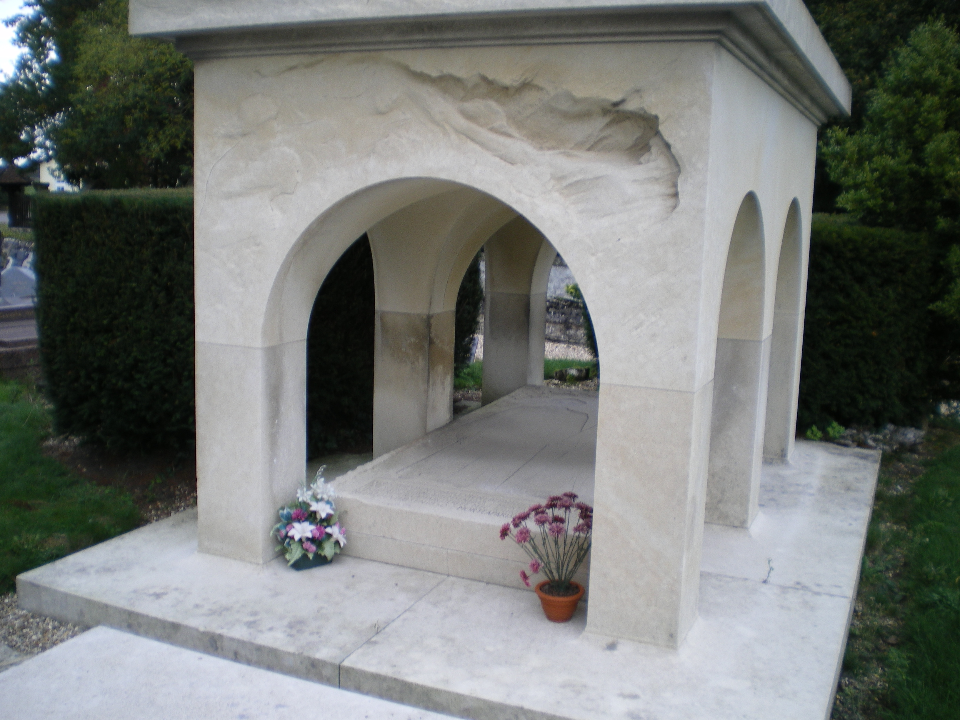 tombe de la famille Saint-Marceaux à Cuy-Saint-Fiacre, travail du sculpteur René de Saint-Marceaux